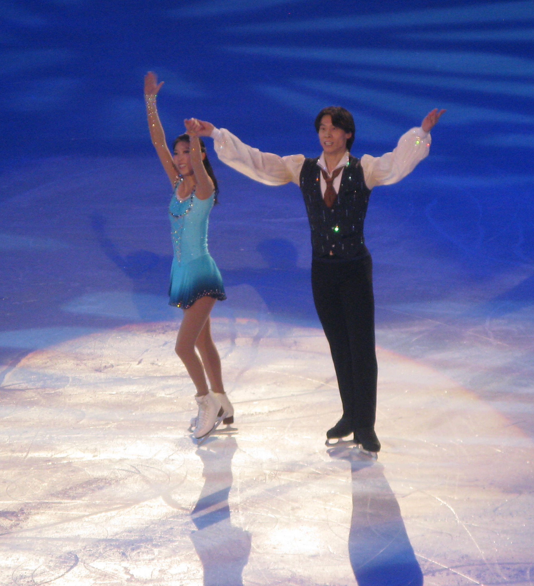 Pang Qing et Tong Jian lors du gala du trophée Éric Bompard 2013 à Paris-Bercy.